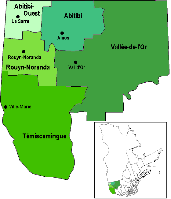 Carte des municipalités régionales de comté de l'Abitibi-Témiscamingue